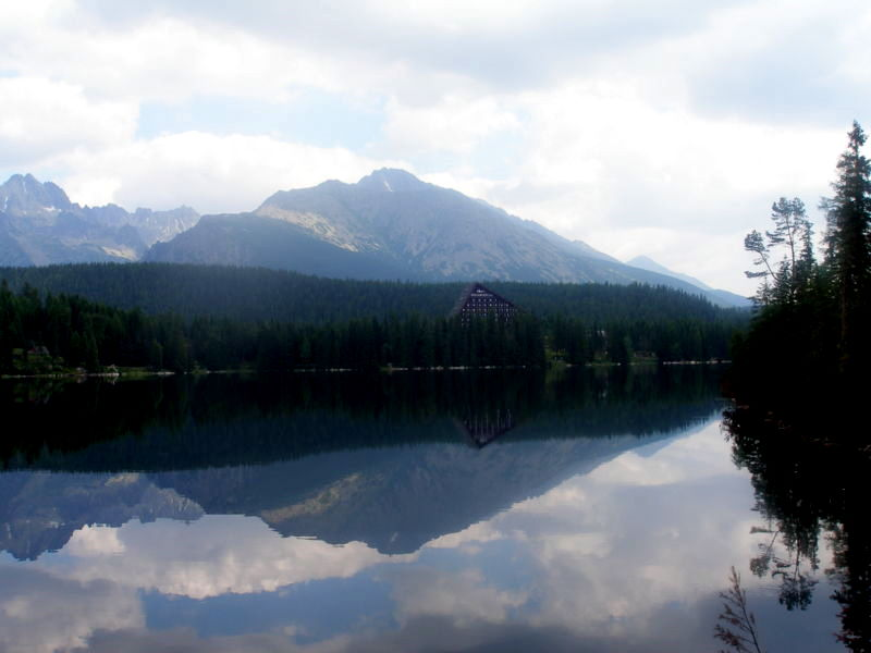 Štrbské Pleso zrkadlenie na vodnej hladine plesa.